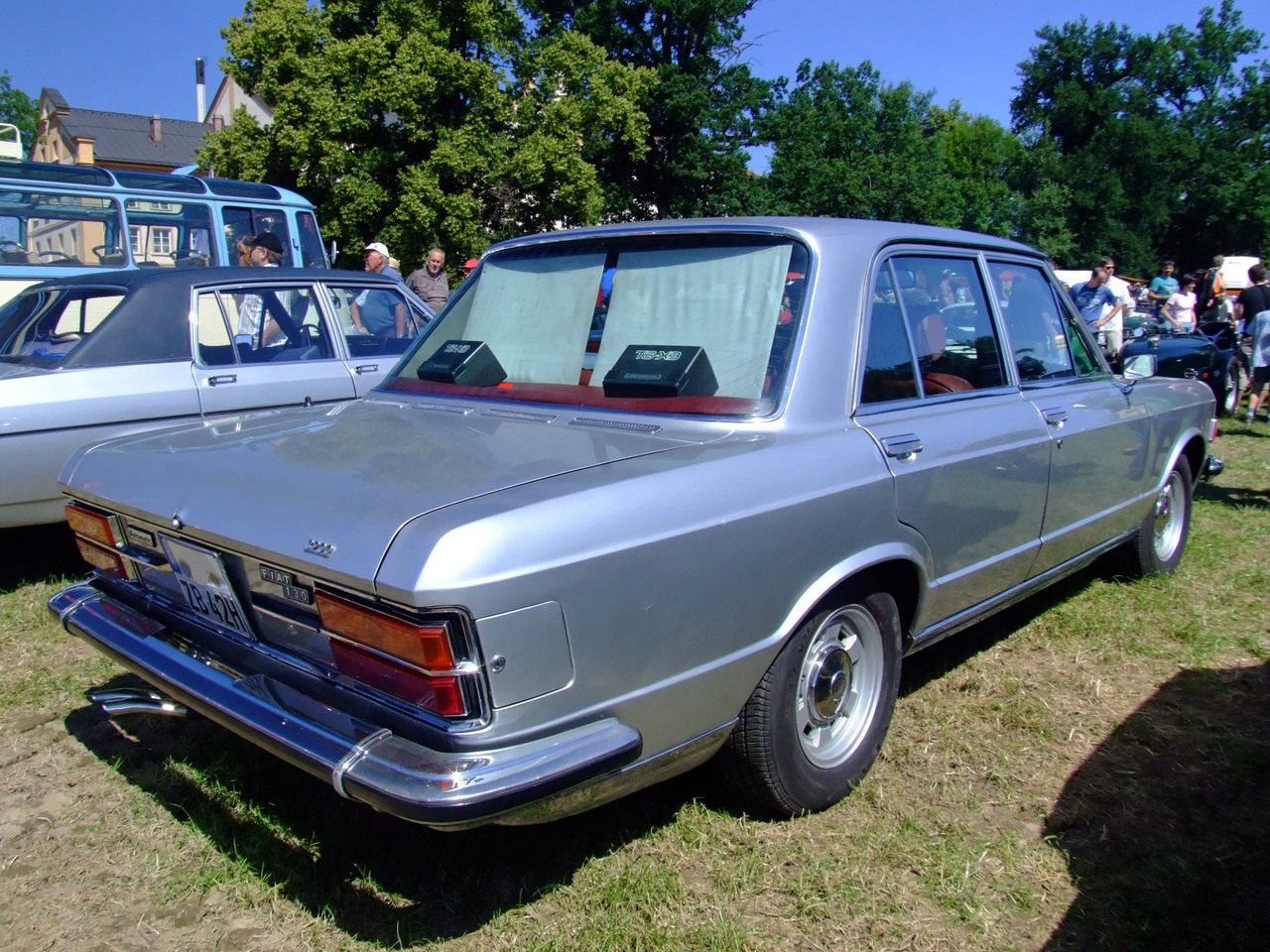 Fiat 130 - 3200, Baujahr: 1976